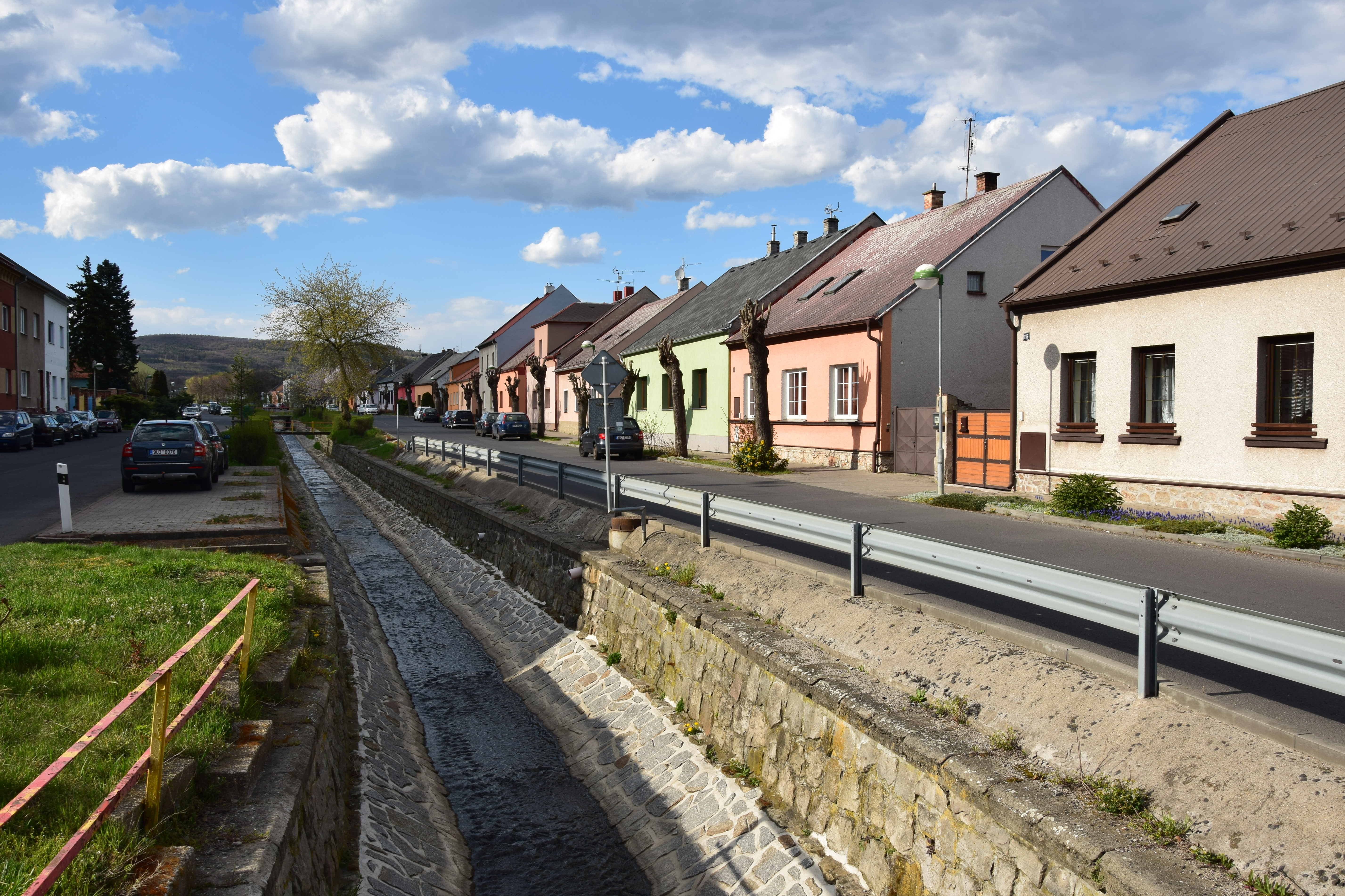 Spořice – střední část Lipové ulice s korytem Hačky